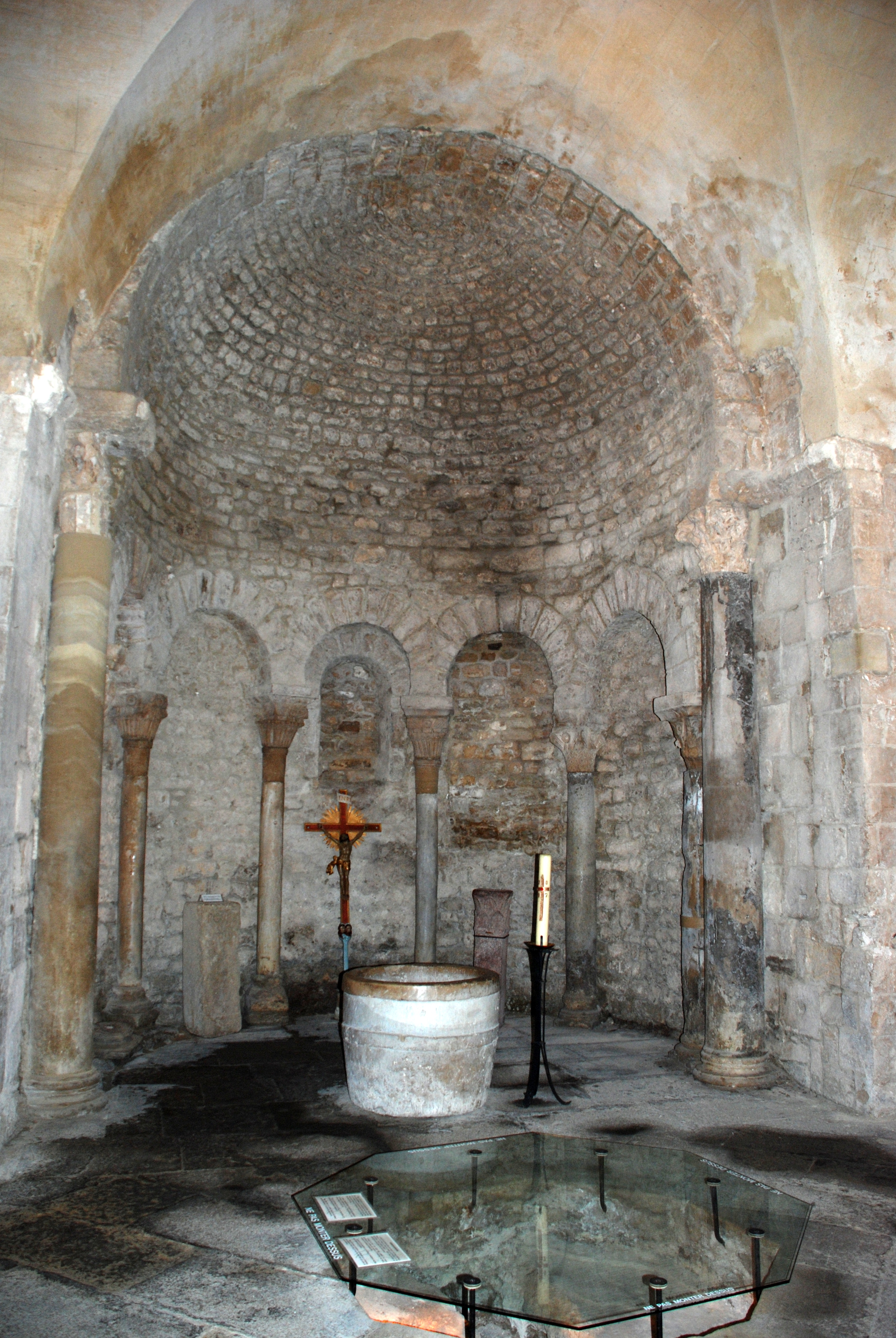 France - Provence - Vaucluse - Baptistère de Venasque - abside ouest